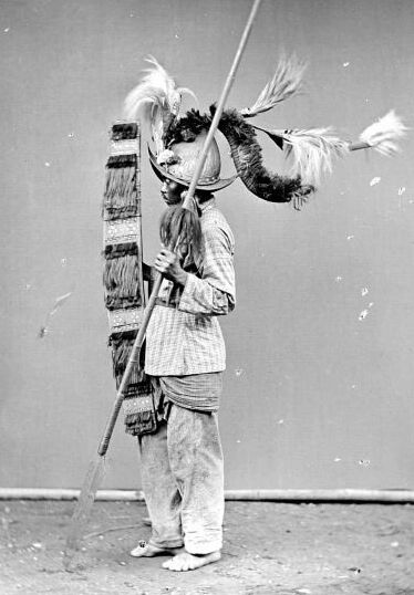 Repronegatief. Man van Zuid-Celebes in krijgskostuum